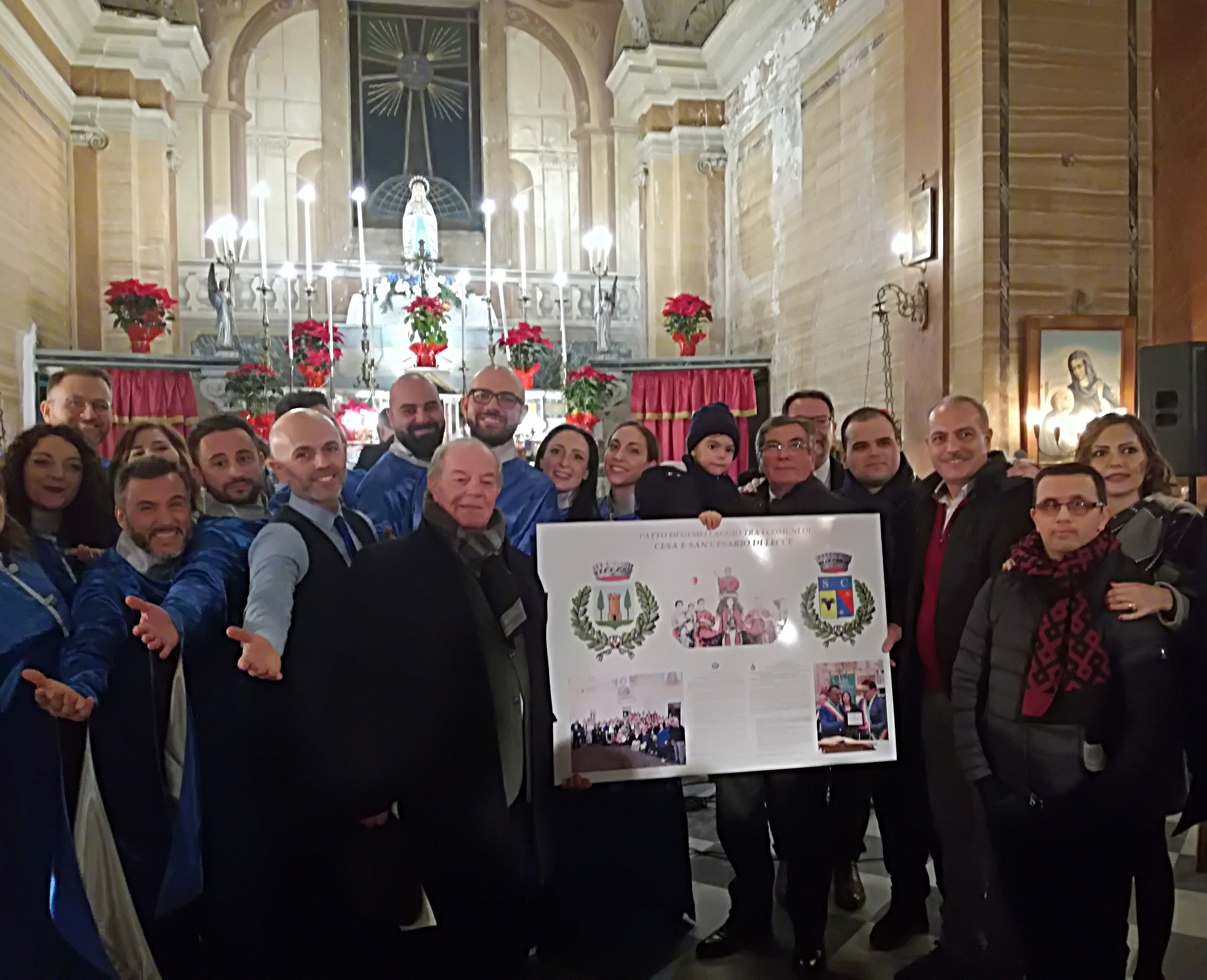 Cesa, 1 Gennaio 2020, Proclamazione del Patto di Gemellaggio con il comune di San Cesario di Lecce in onore di S. Cesario diacono e martire